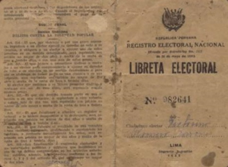 Libreta Electora emitida en Perú desde 1931 a 1946